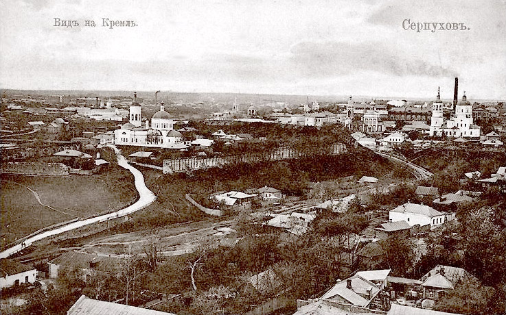 Serpukhov_Kremlin